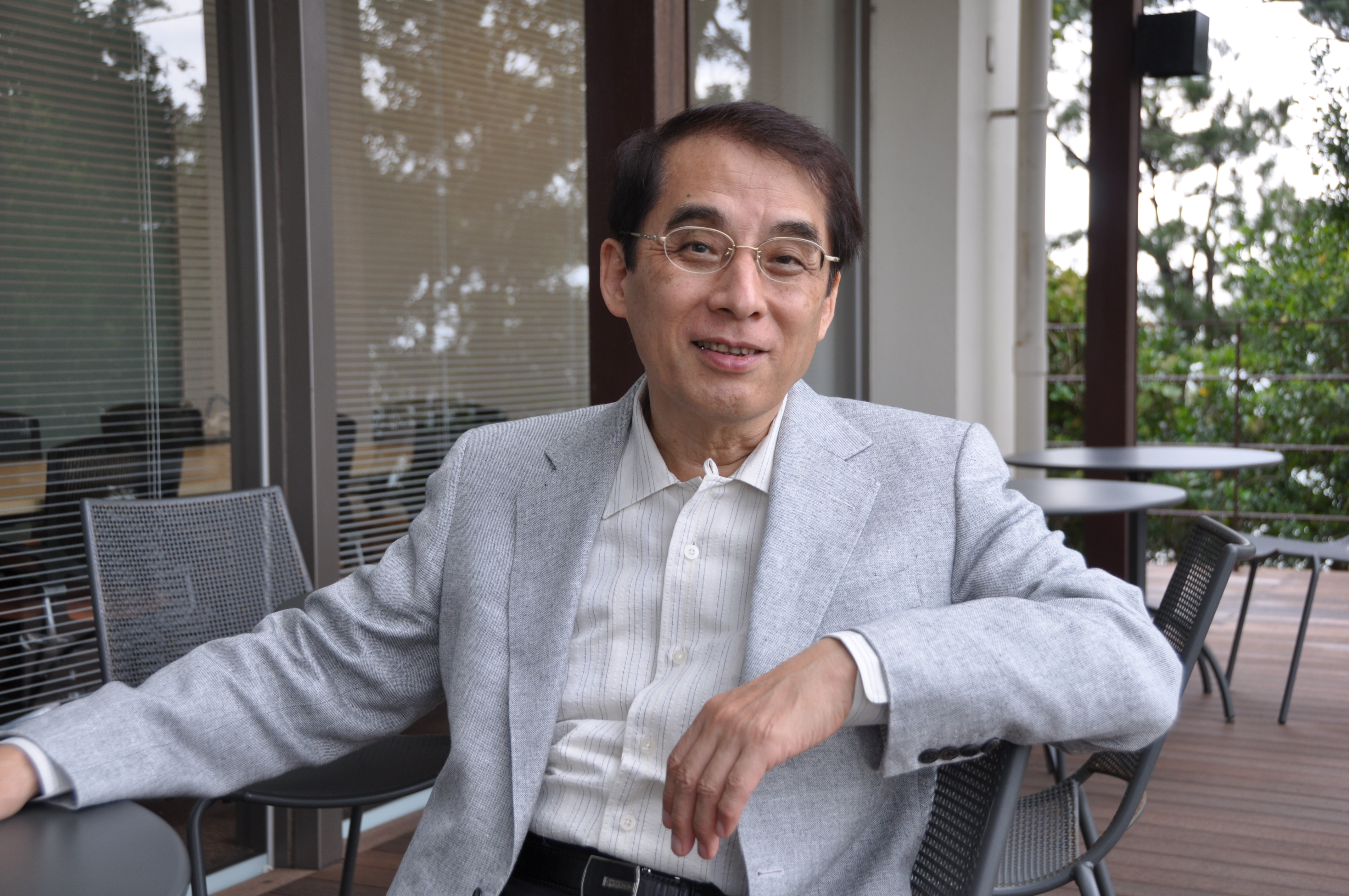 電子顕微鏡ユニット | 外村 彰